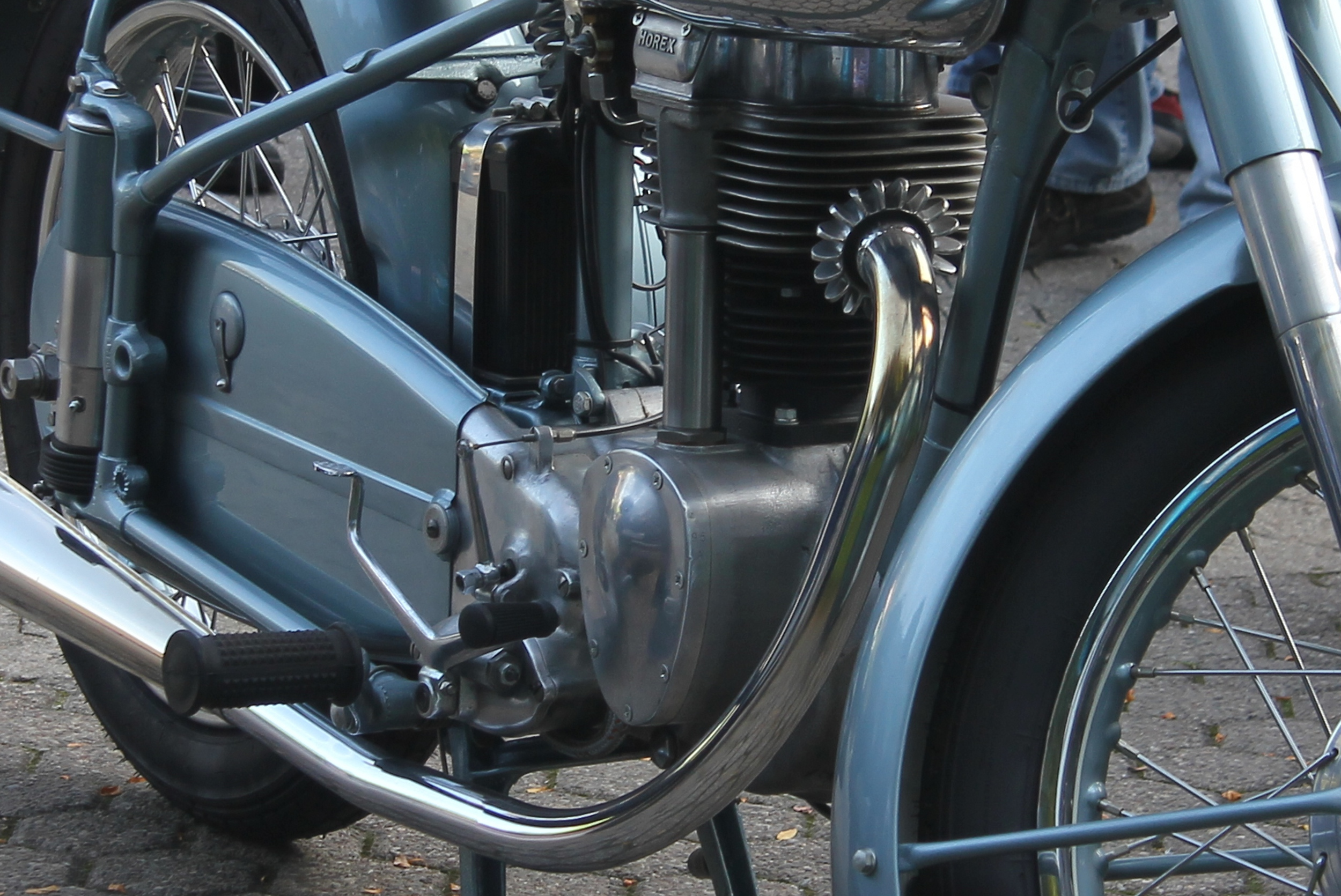 Horex Regina Sport bei der Moselschiefer-Classic des AC Mayen